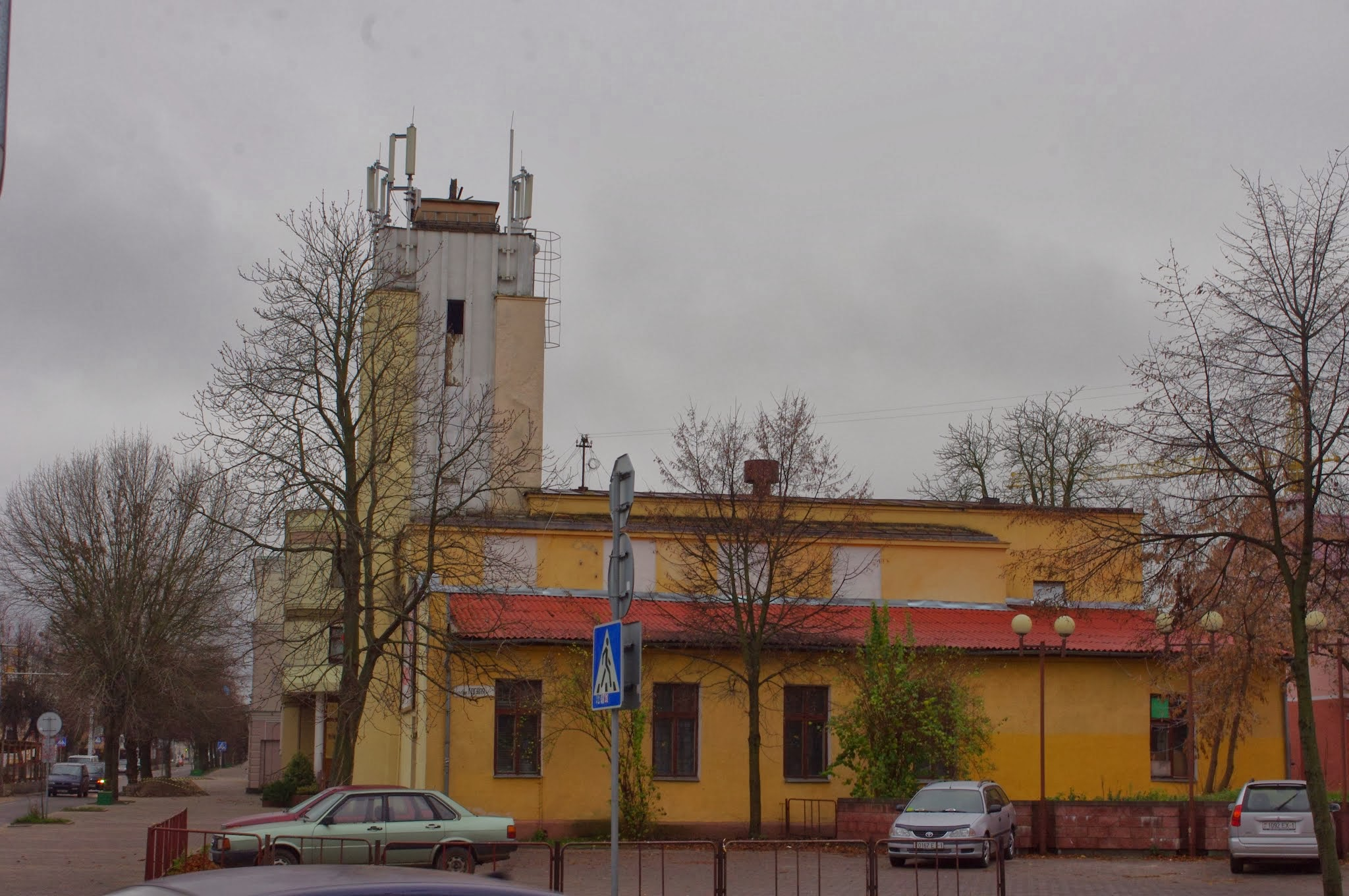 Lieninski rajon, Brest, Belarus